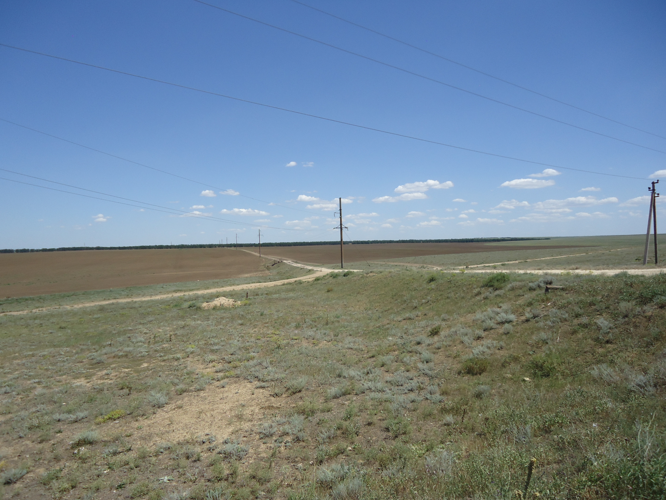 Балка Джугеньская-Ахтанская, Крым.